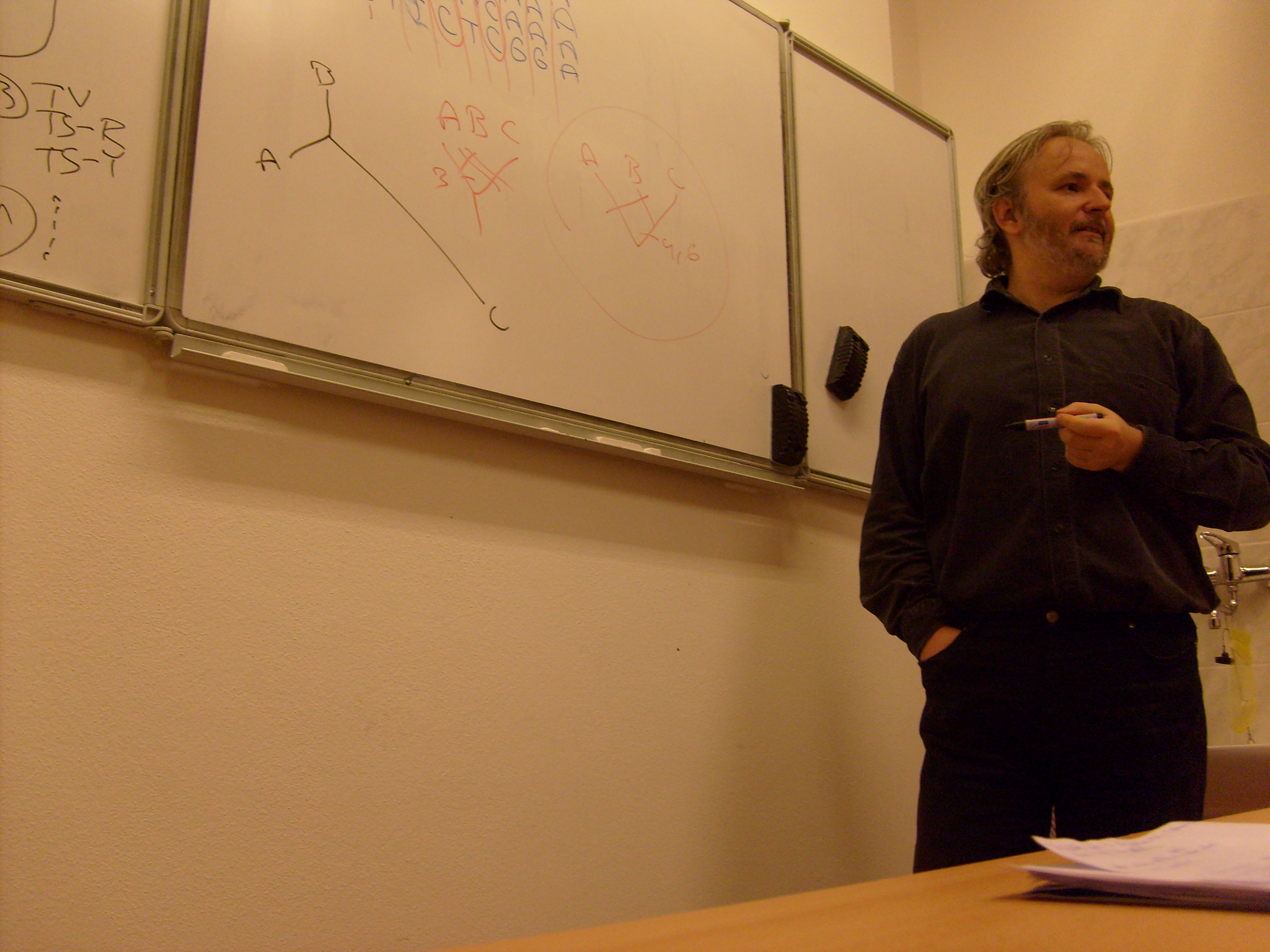 Jan Zrzavý přednáší fylogenetiku na Přírodovědecké fakultě Jihočeské univerzity.